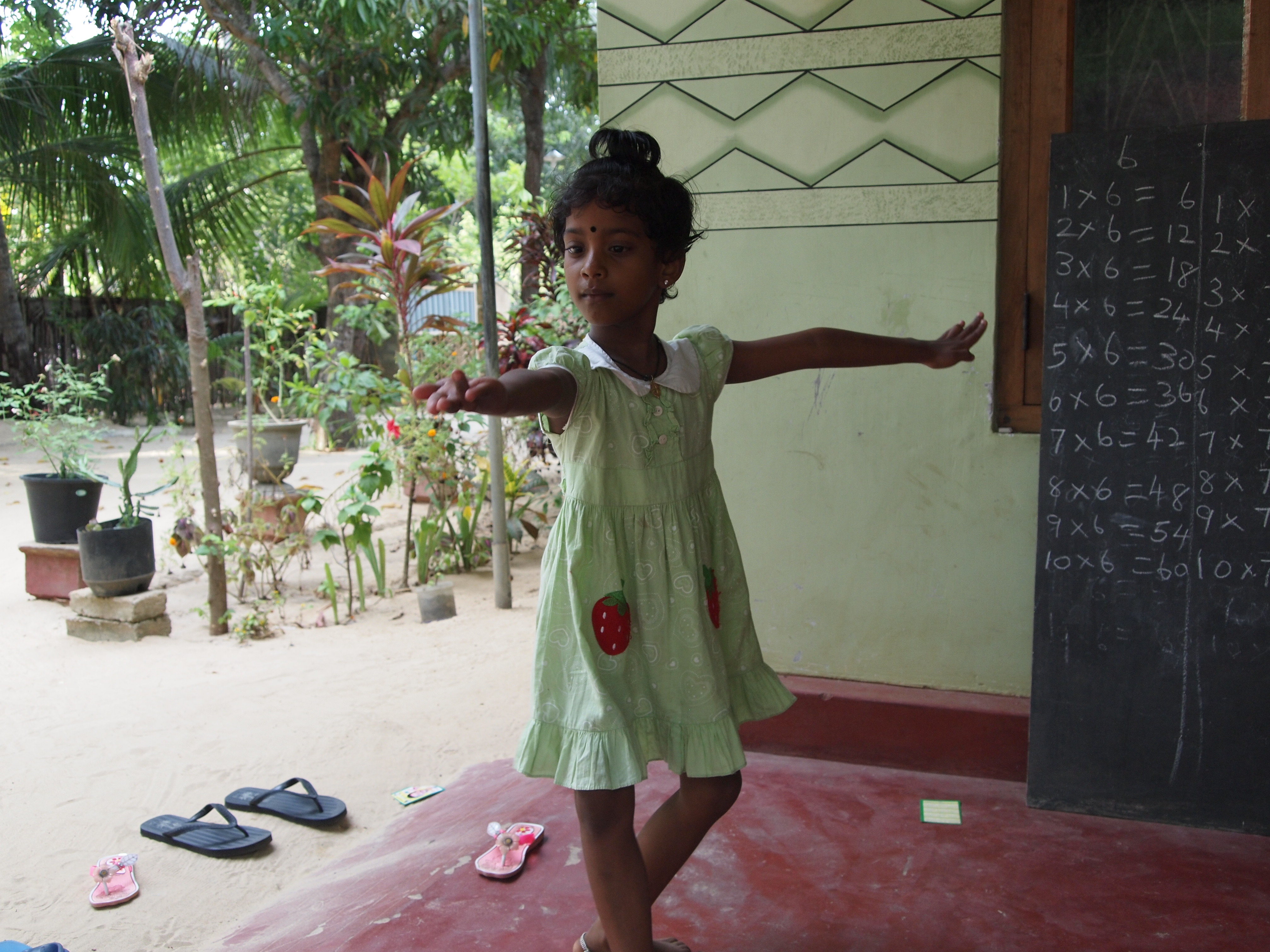 நடனமாடும் சிறுமி